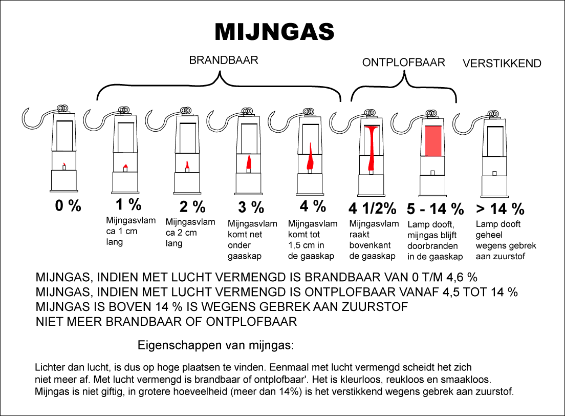 Instruktie gebruik benzinelamp. Instruktie is gemaakt door Harria, naar voorbeeld instruktie nederlandse mijnen t.b.v. het artikel op site Mijnbouw-Nederlands-Limburg waarvan hij de webmaster is. Instructie was eerder door hem Public Domain opgevoerd als Image006.jpg en door Ed Stevenhagen 27 jul 2005 12:45 (CEST) gedigitaliseerd en omgezet in png. Vrij te gebruiken.